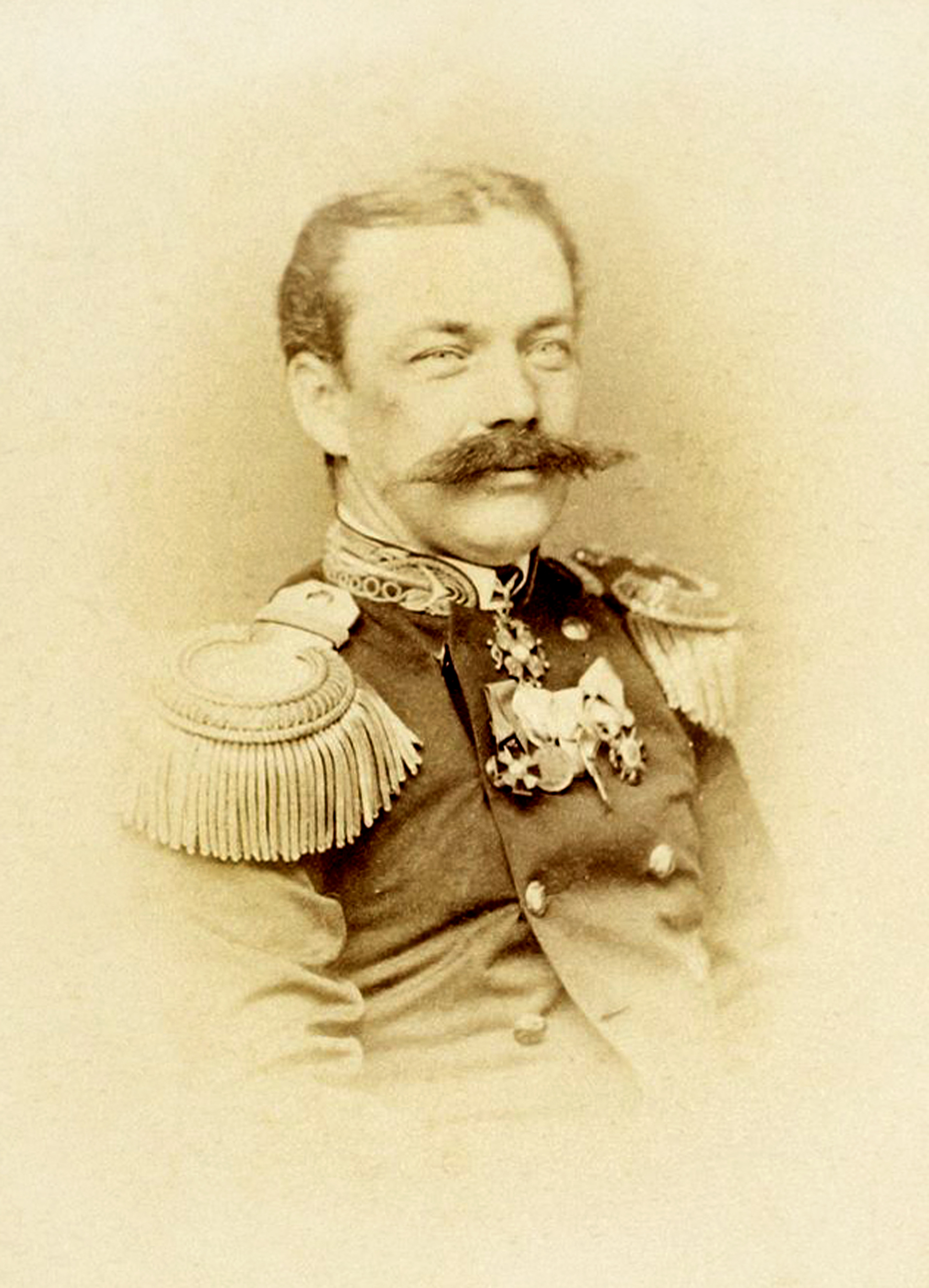 Командир клипера «Изумруд» капитан-лейтинант Владимир Николаевич Брылкин. Фото сделано в 1865-1867 годах в мастерской Х. Поетца, Кебенхавен (Копенгаген). Copenhagen, Denmark